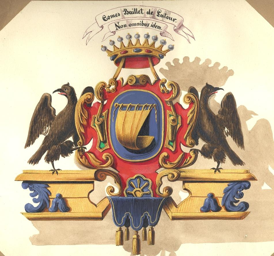 Wappen Baillet de Latour, 18. oder 19. Jh.